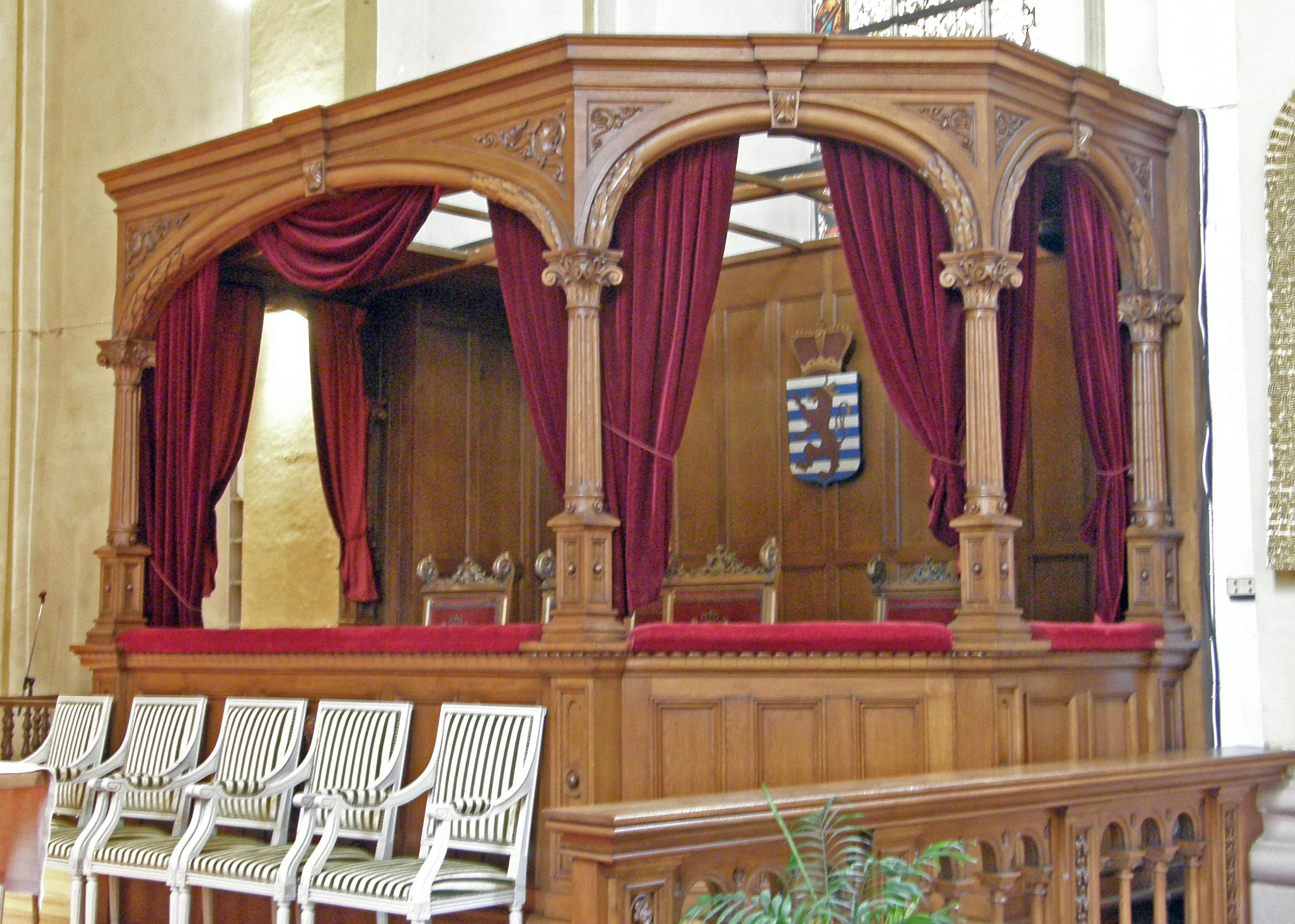 DR KIE.